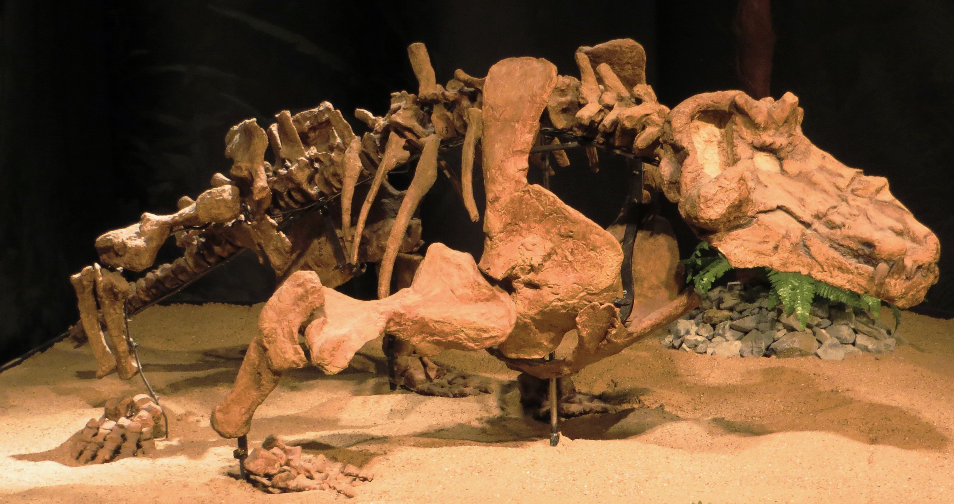 Fossil of Estemmenosuchus, an extinct therapsid- Took the picture at Dinosaurium, Prague